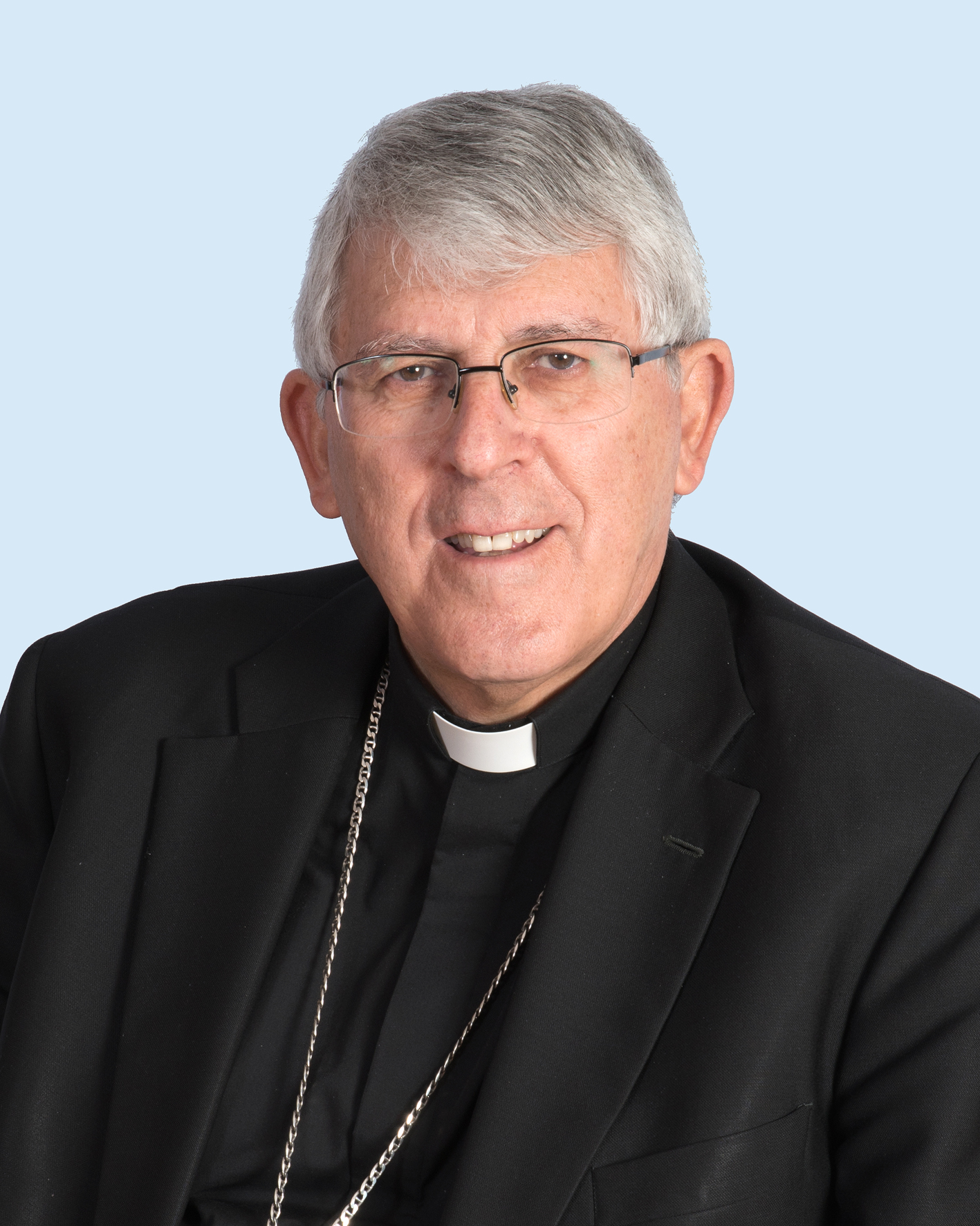 Mons. Rodríguez Plaza